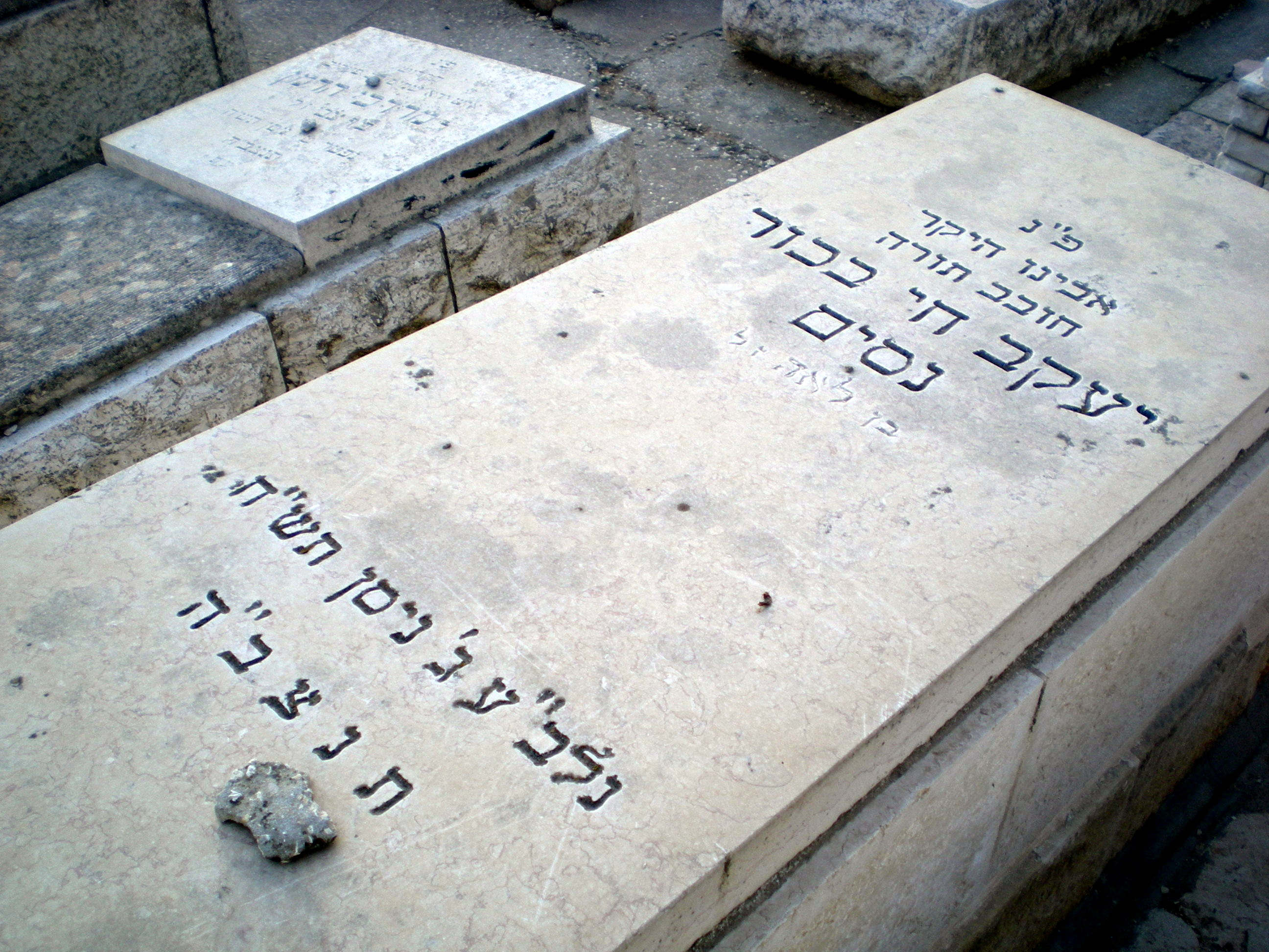 מצבת הקבר של הרב יעקב חי בכור נסים